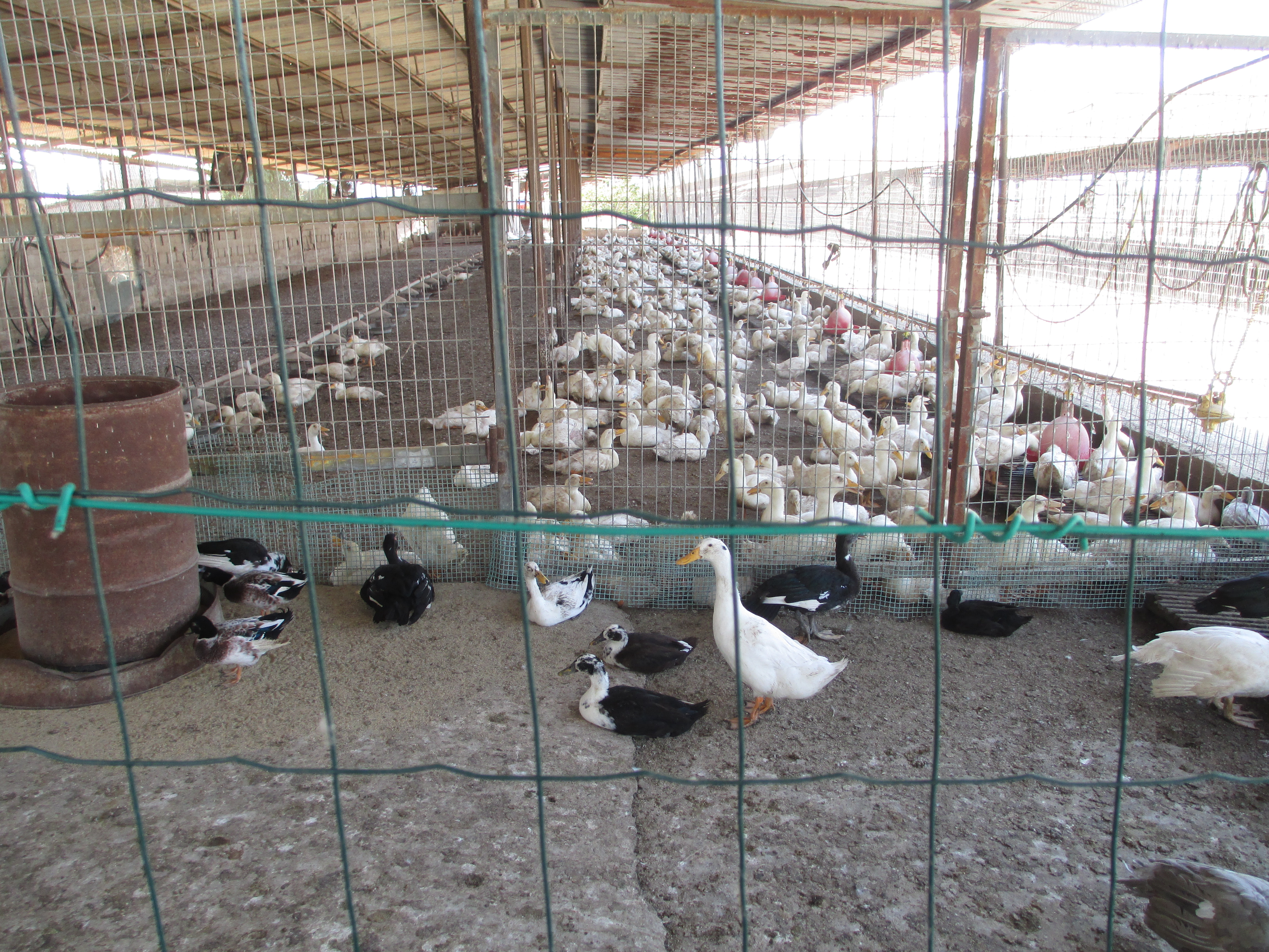 חוות ברווזים בכפר, בכפר ברוך